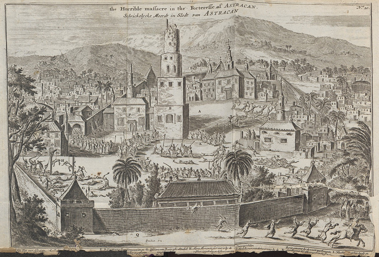 From Jan Janszoon Struys (1746): Drie aanmerkelyke reizen